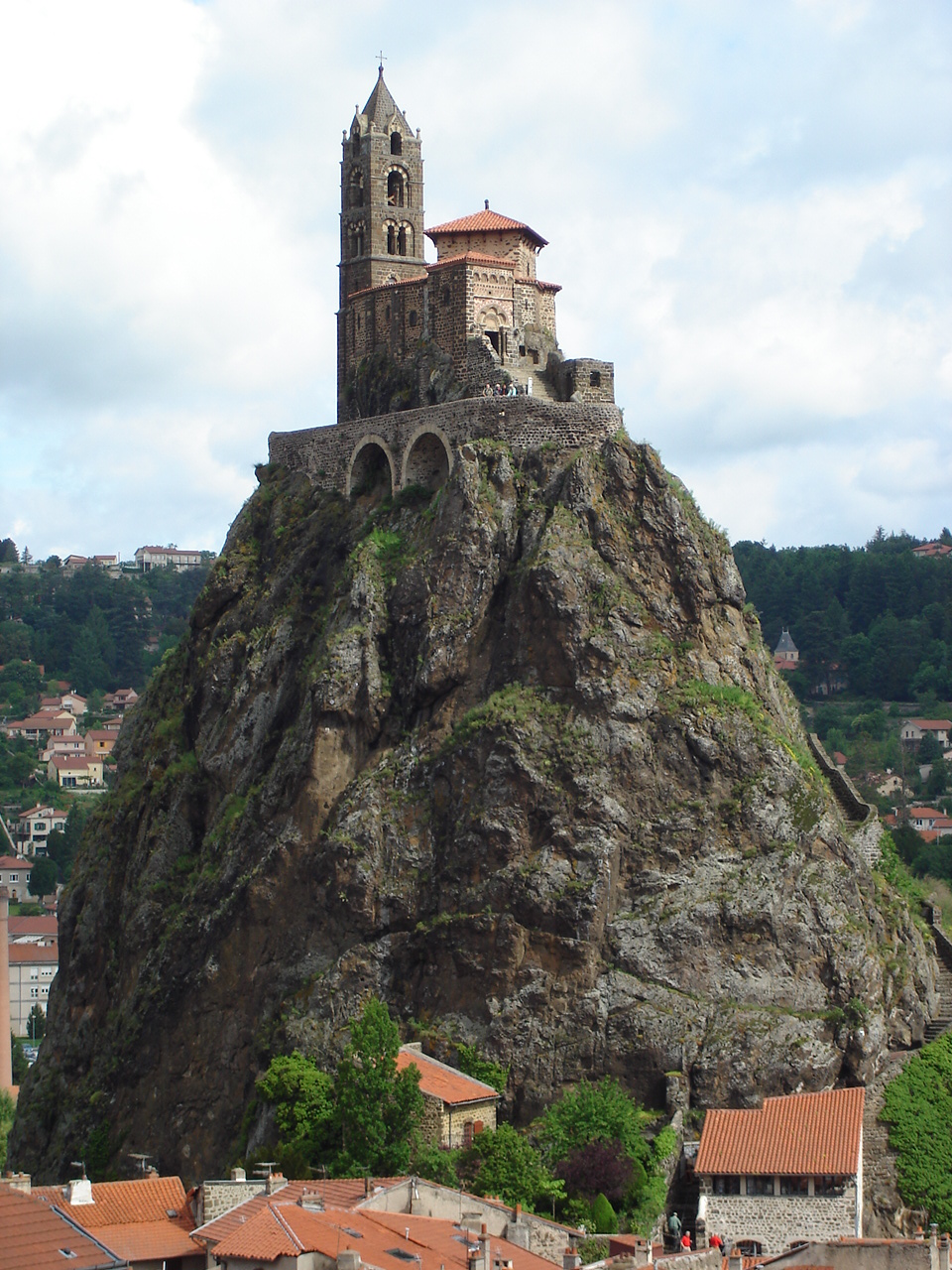 Le Puy-en-Velay, préf. de la Haute-Loire, France (région Auvergne). Rocher St.-Michel à Aiguilhe.